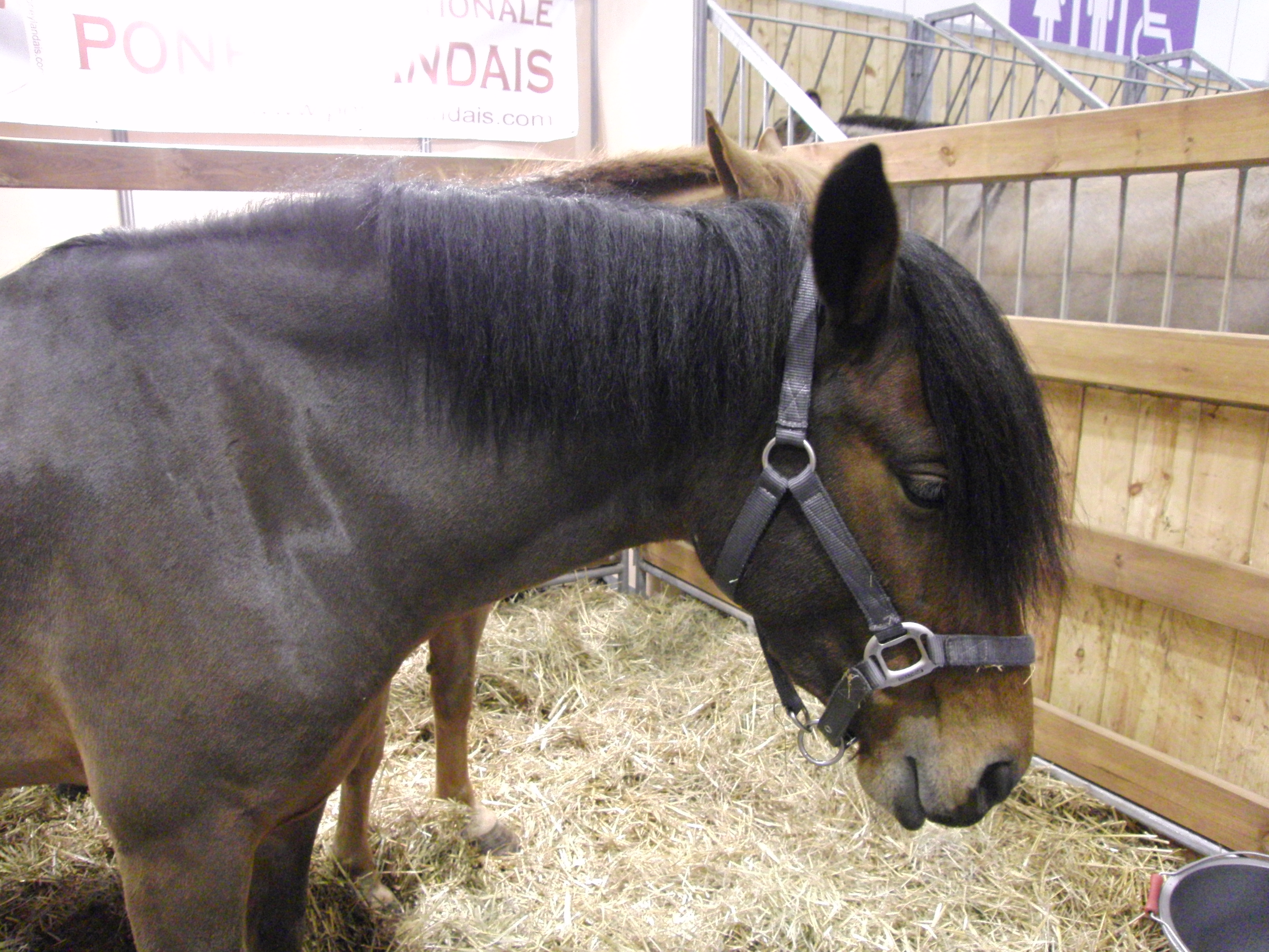 Poney landais, Salon du cheval de Paris 2014, Parc des expositions de Paris-Nord Villepinte, France